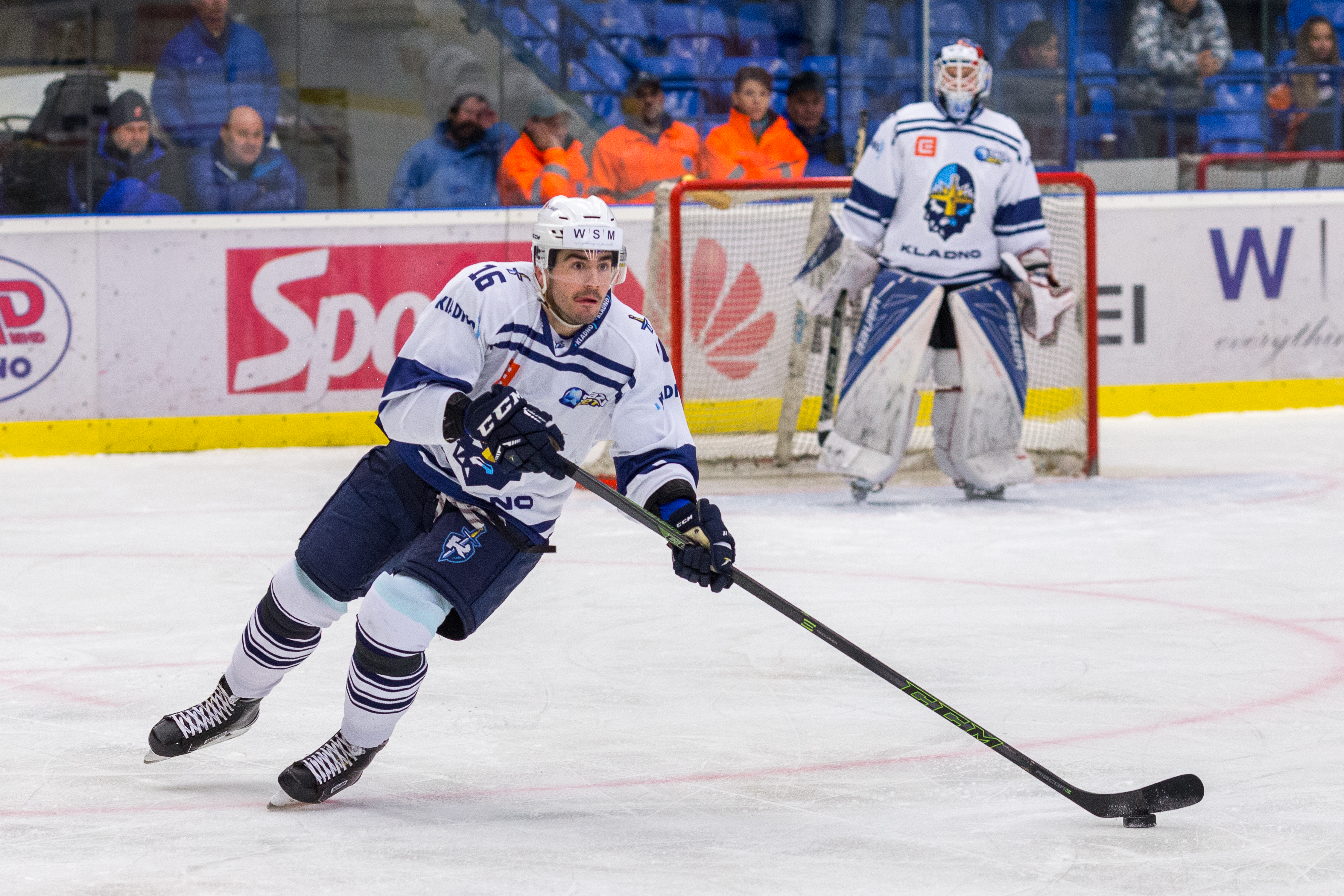 WSM Liga - 30-11-2016 18:00 CET - Round 29 Rytíři Kladno 2:4 (1:1, 1:3, 0:0) HC Stadion Litoměřice